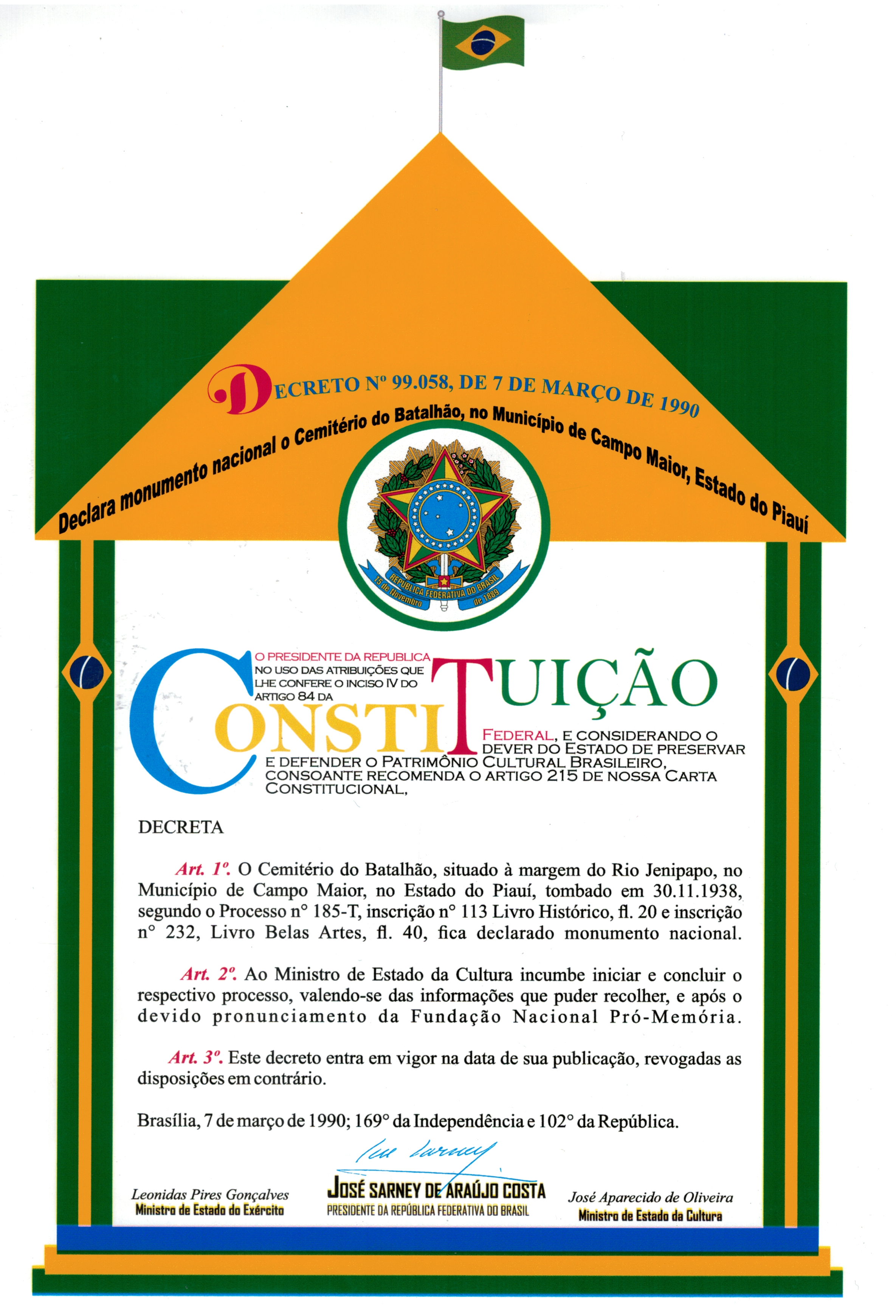 Placa comemorativa que declara o local da batalha do Jenipapo, no Piauí, como Monumento nacional brasileiro.